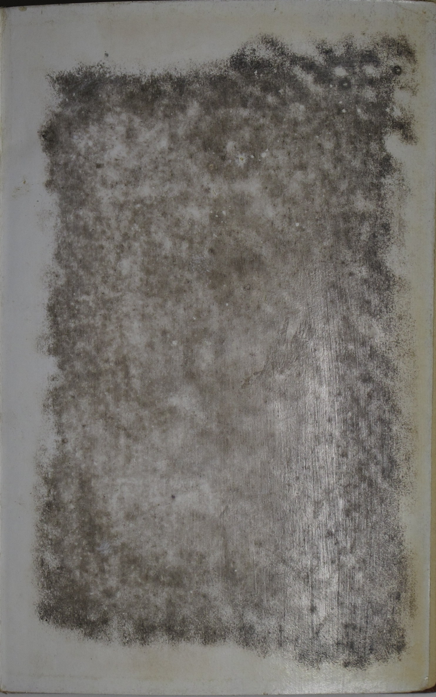 Papier mit Bleiweiß, schwarze Verfärbung, Vorsatzpapier eines Buches, Ende 19. Jahrhundert, Exemplar der Staatsbibliothek zu Berlin – Preußischer Kulturbesitz, Signatur 19 ZZ 3573